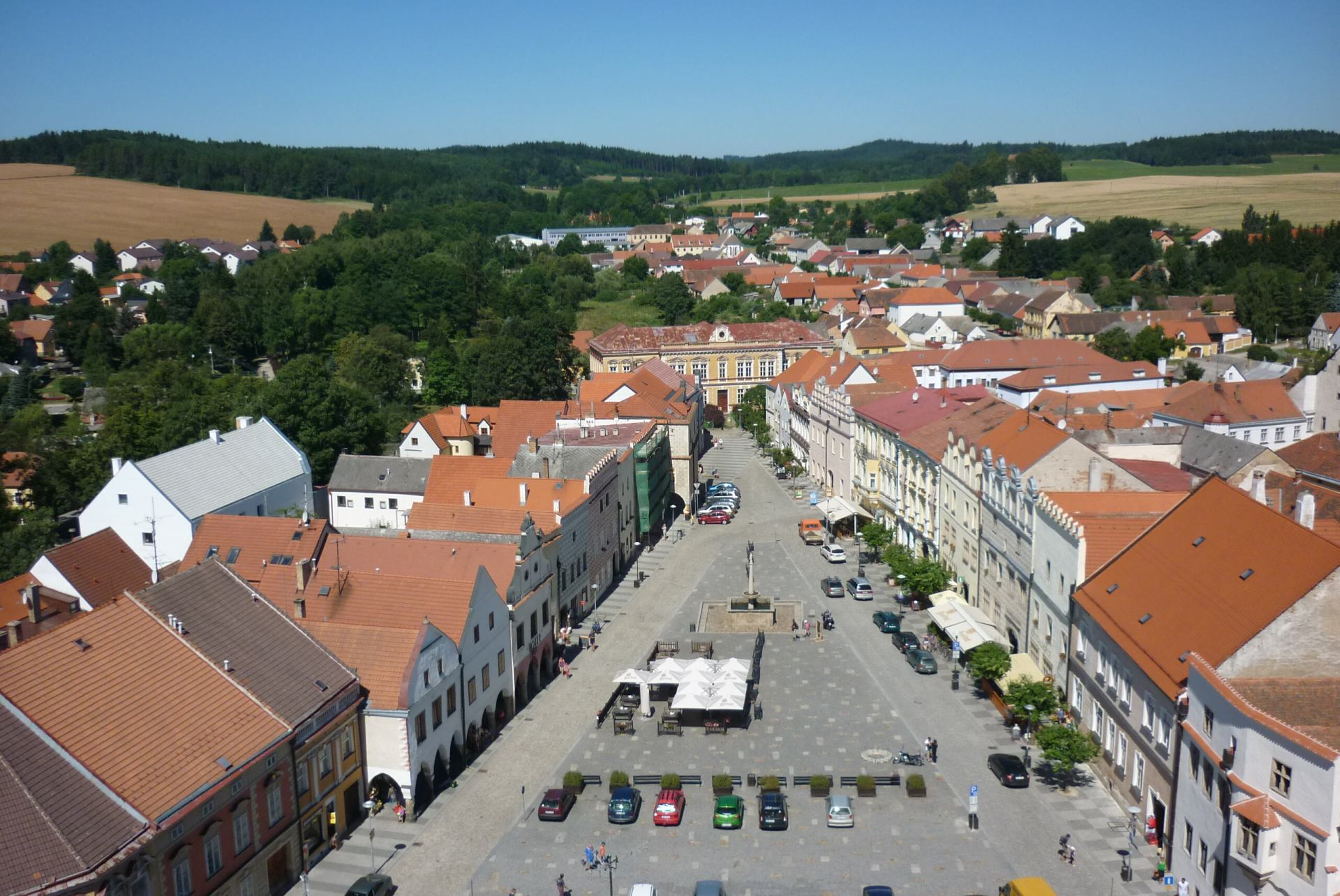 Náměstí Míru Slavonice